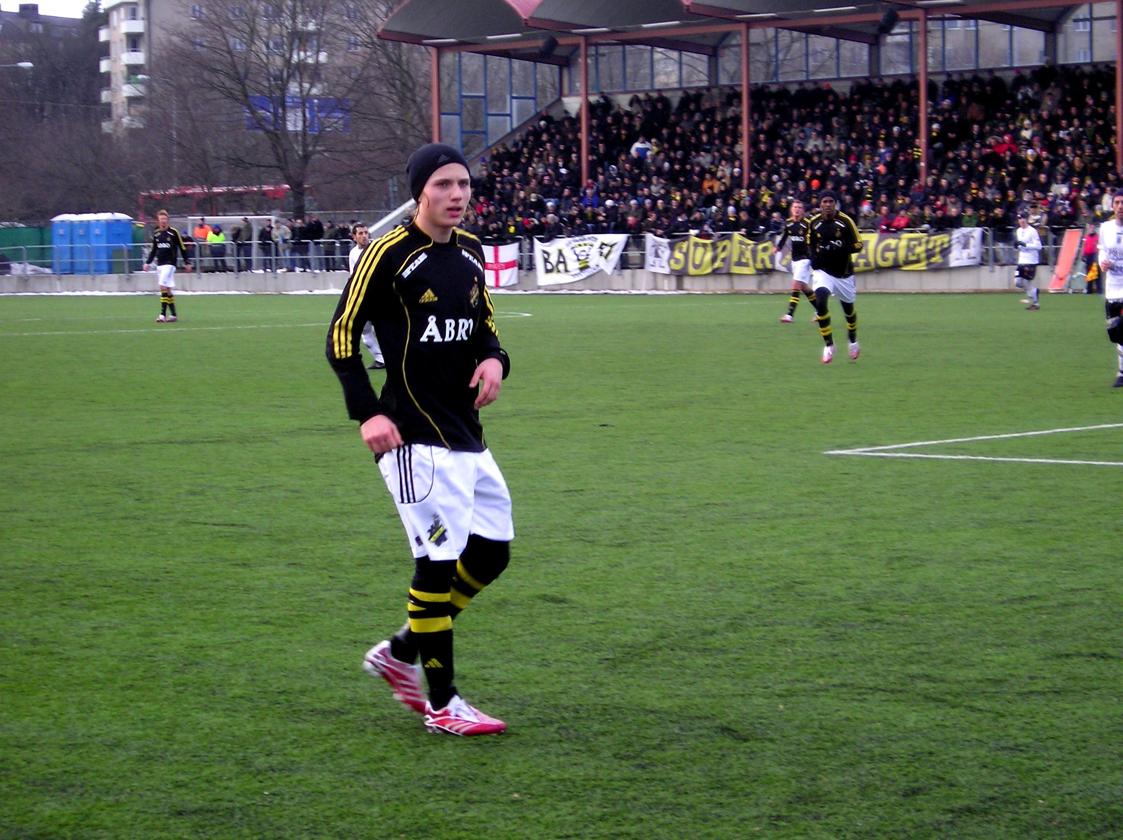 (Pierre Bengtsson spelar träningsmatch med AIK)